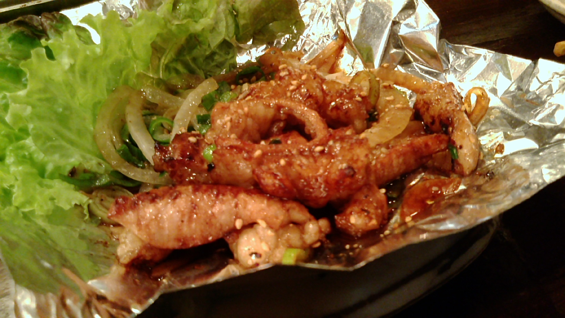 F1000230.JPG